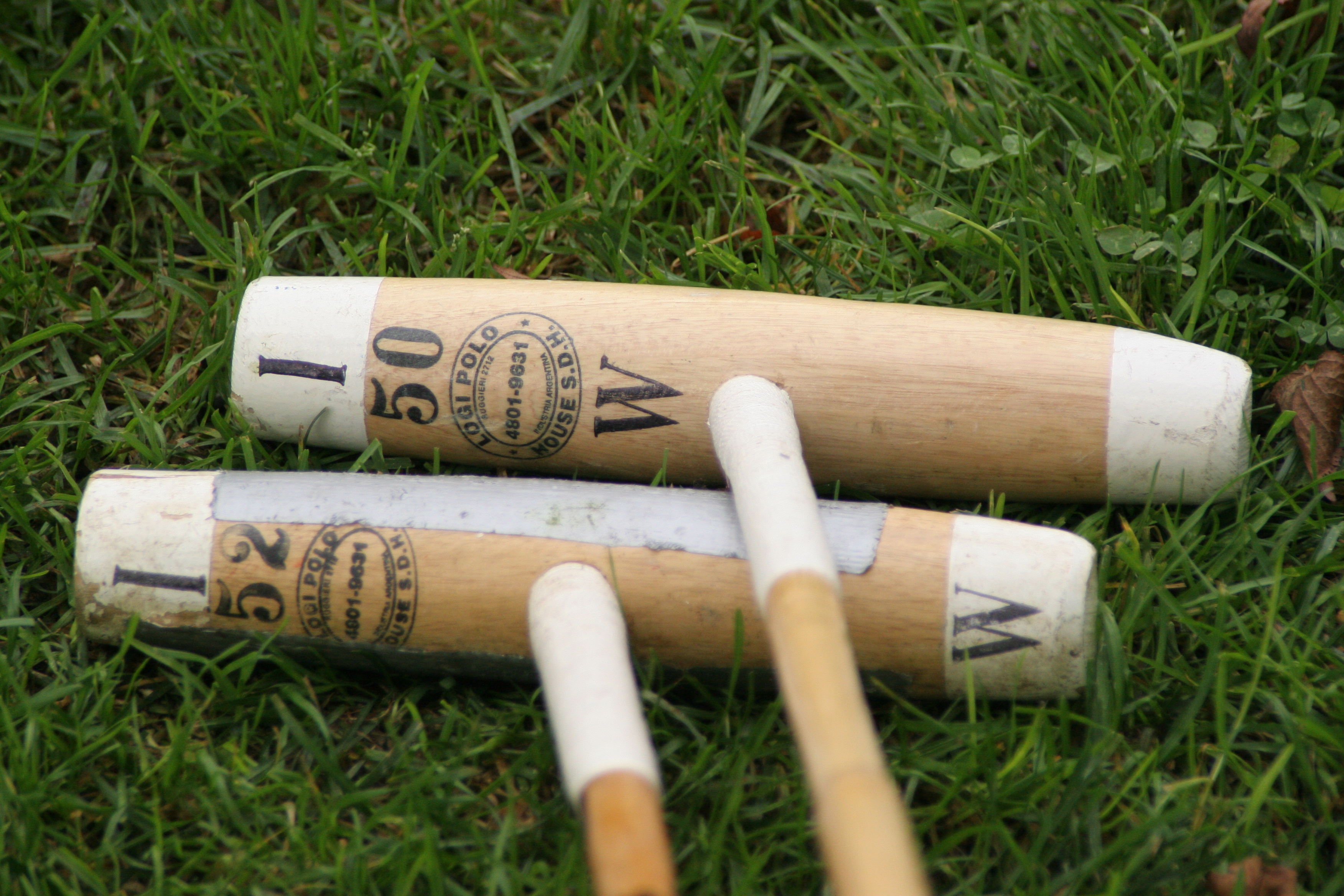 Malletenden, Zigarren